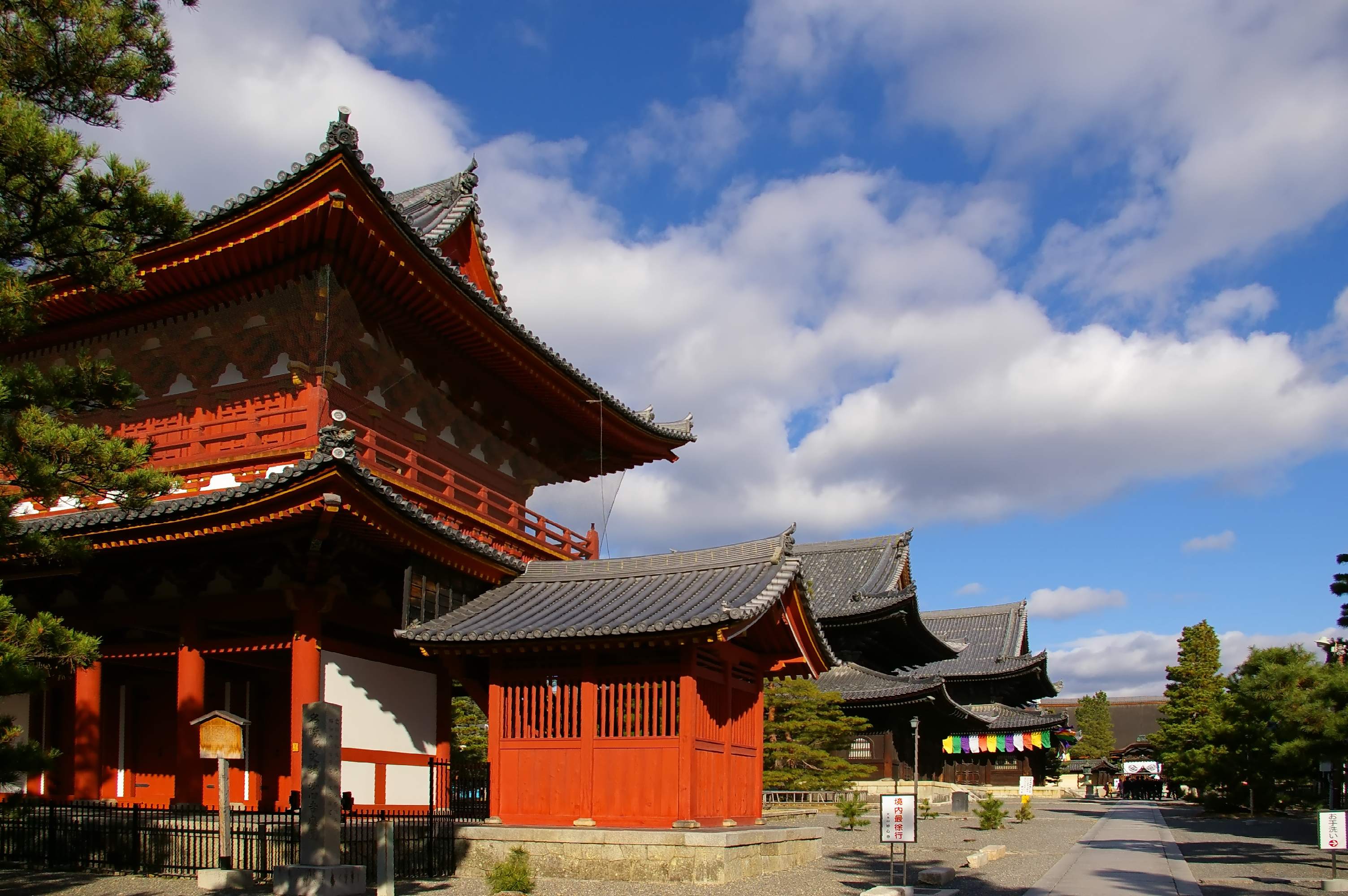 Myoshinji-temple